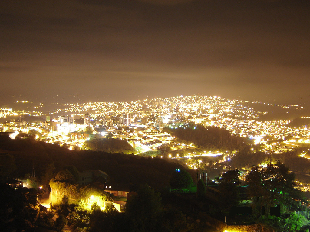 Vista Nocturna de Manizales, Caldas, Colombia.